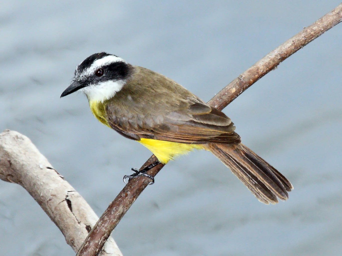 Lesser Kiskadee (Pitangus lictor). Taken in Panama.